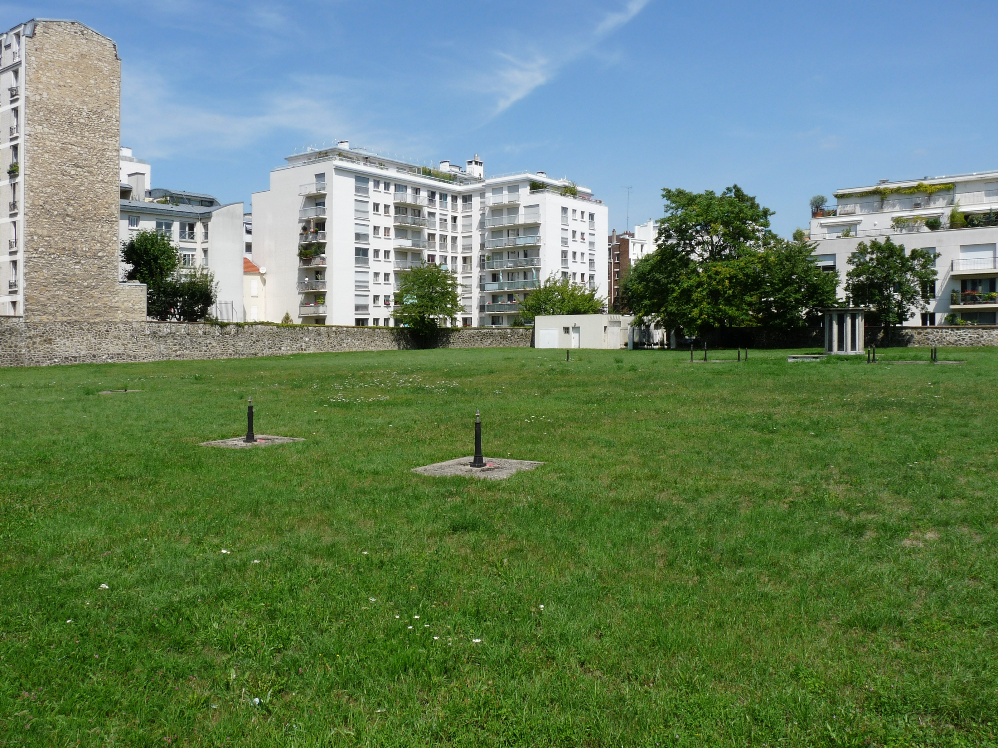 Le réservoir de Charonne à Paris, vue depuis la rue Stendhal